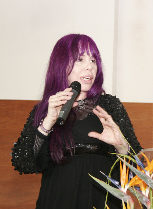 A pastora Baby do Brasil durante o evento do Chá com as mulheres na Igreja Cristã de Alphaville, São Paulo.